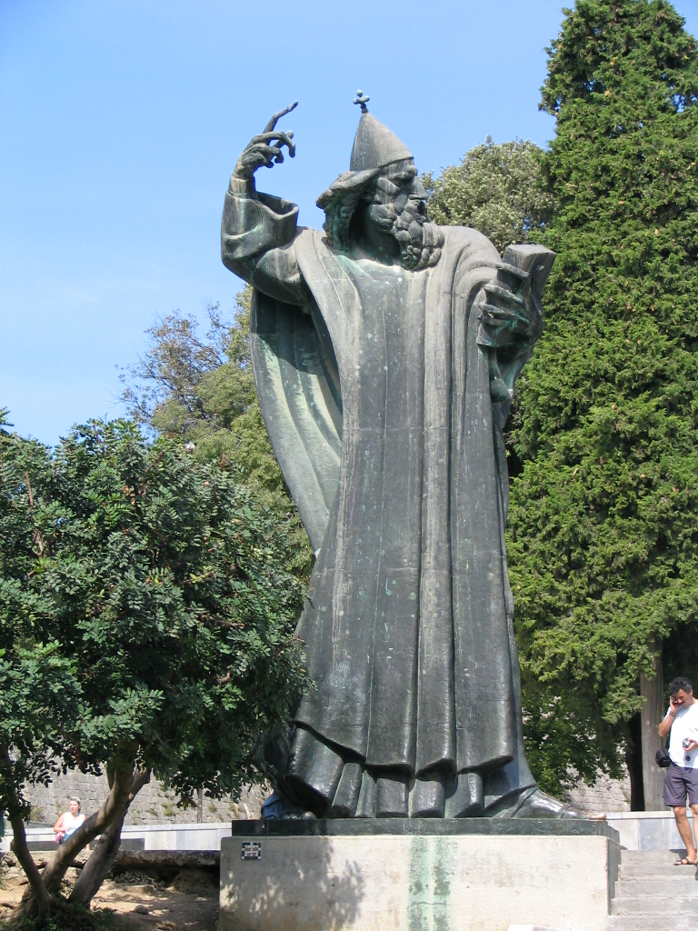 Памятник Гргуру Нинскому